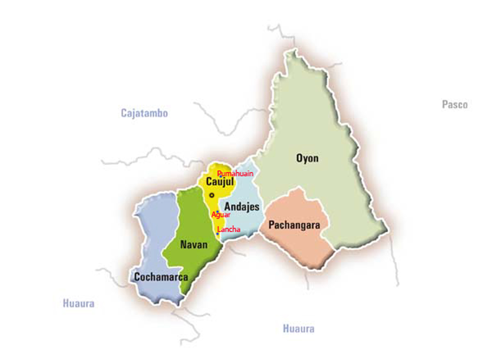 Provincia de Oyon Lima